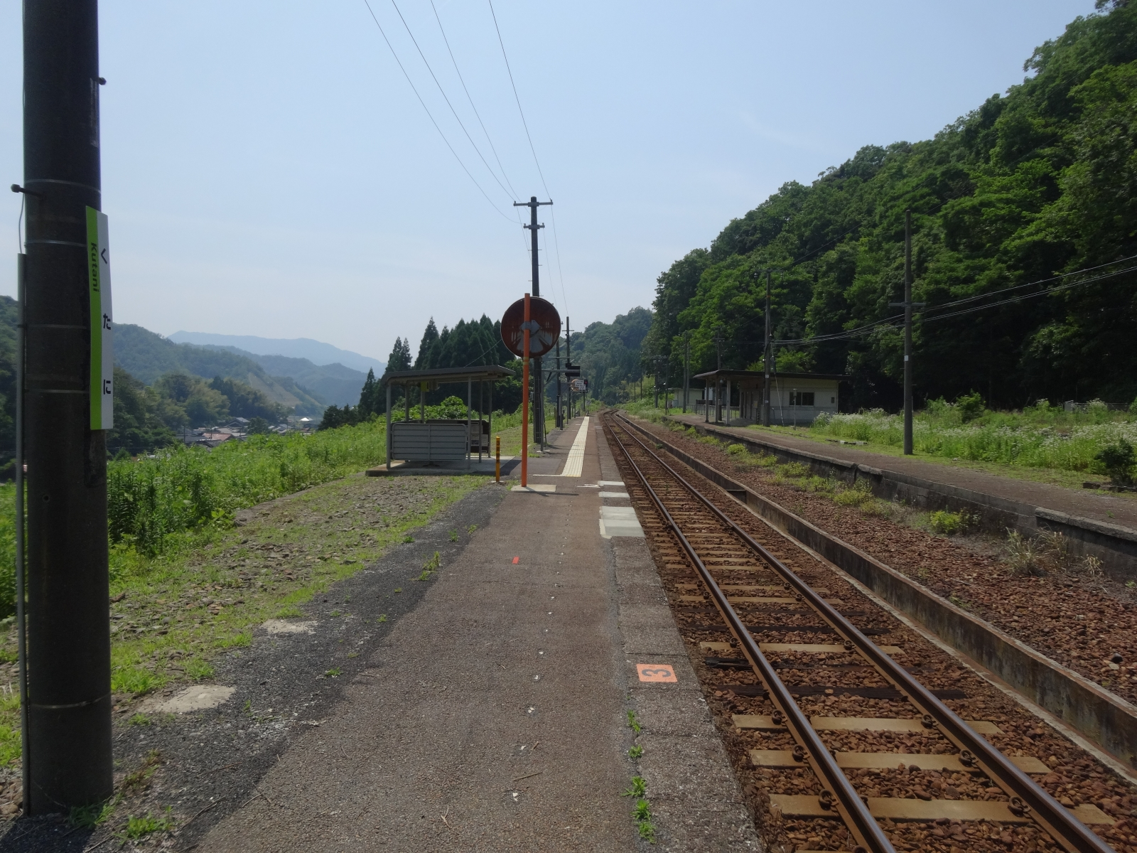 久谷駅構内（2018年6月25日） Sony Cyber-shot DSC-WX300